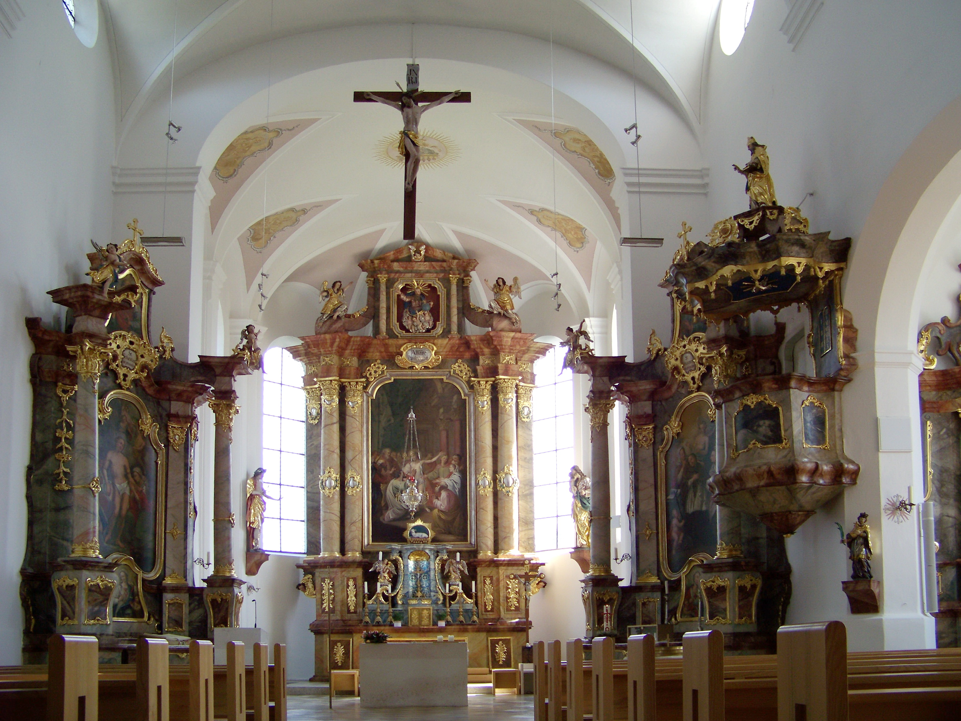 Adlkofen, Hauptstraße 9. Katholische Pfarrkirche St. Thomas. Dreischiffige Basilika. Barocke Anlage mit eingezogenem Chor.